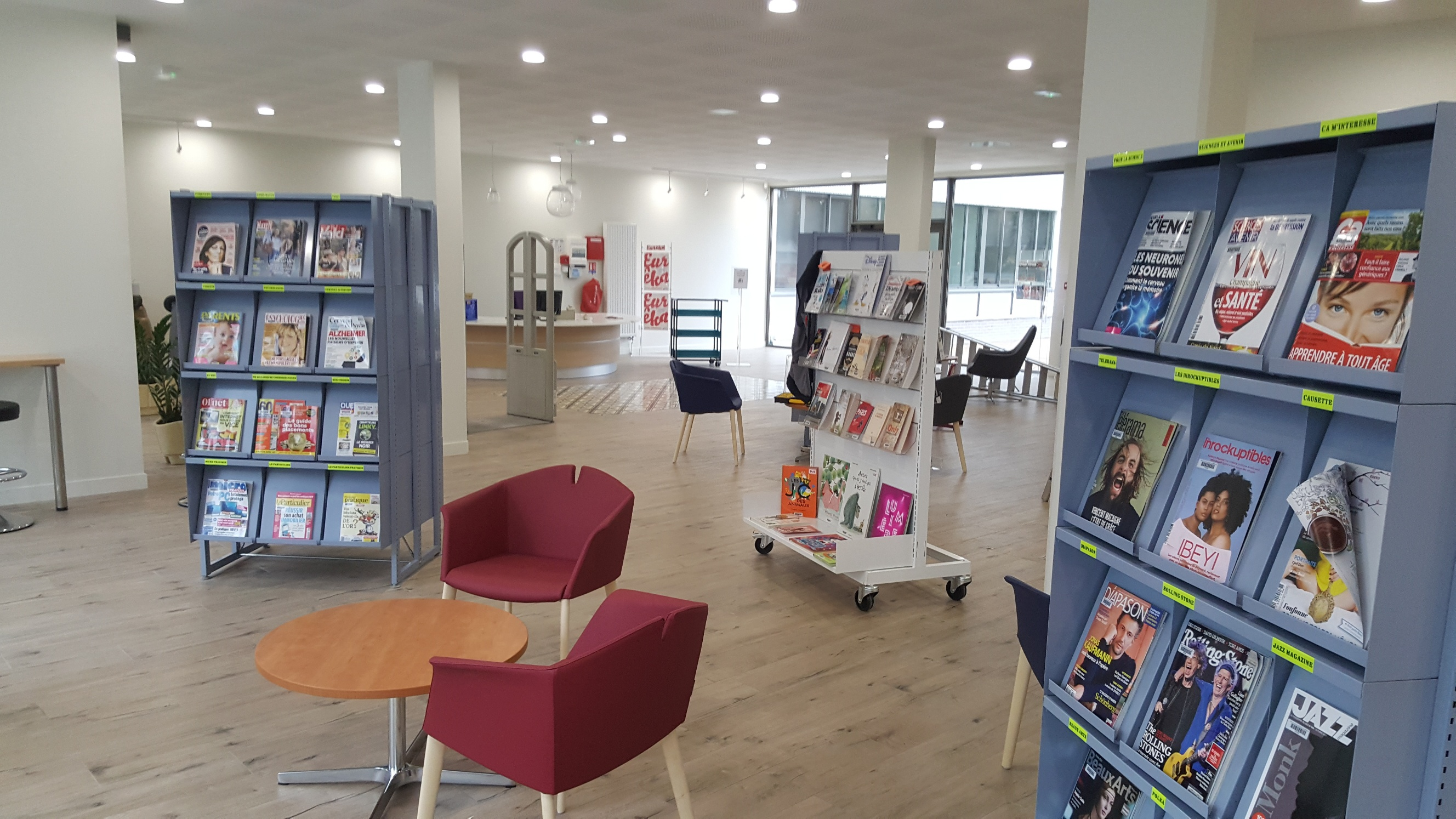 Vue du hall d'accueil de la Médiathèque en octobre 2017